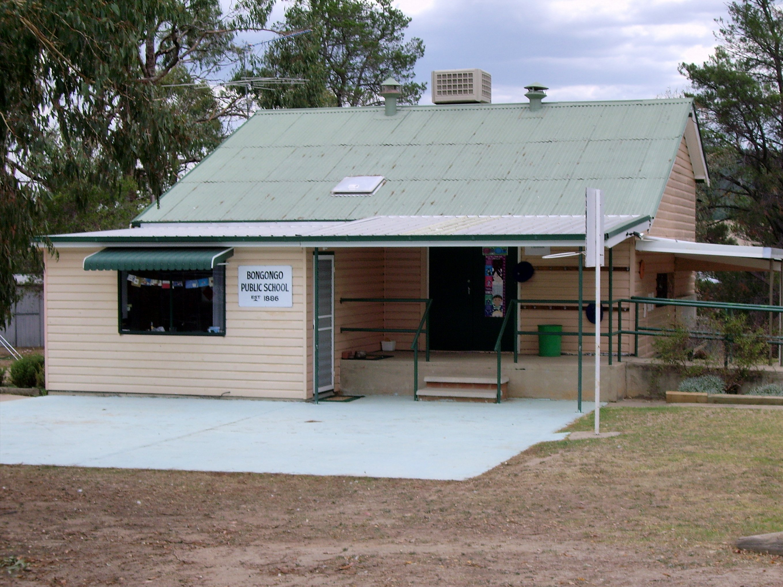 Bongongo School Adjungbilly